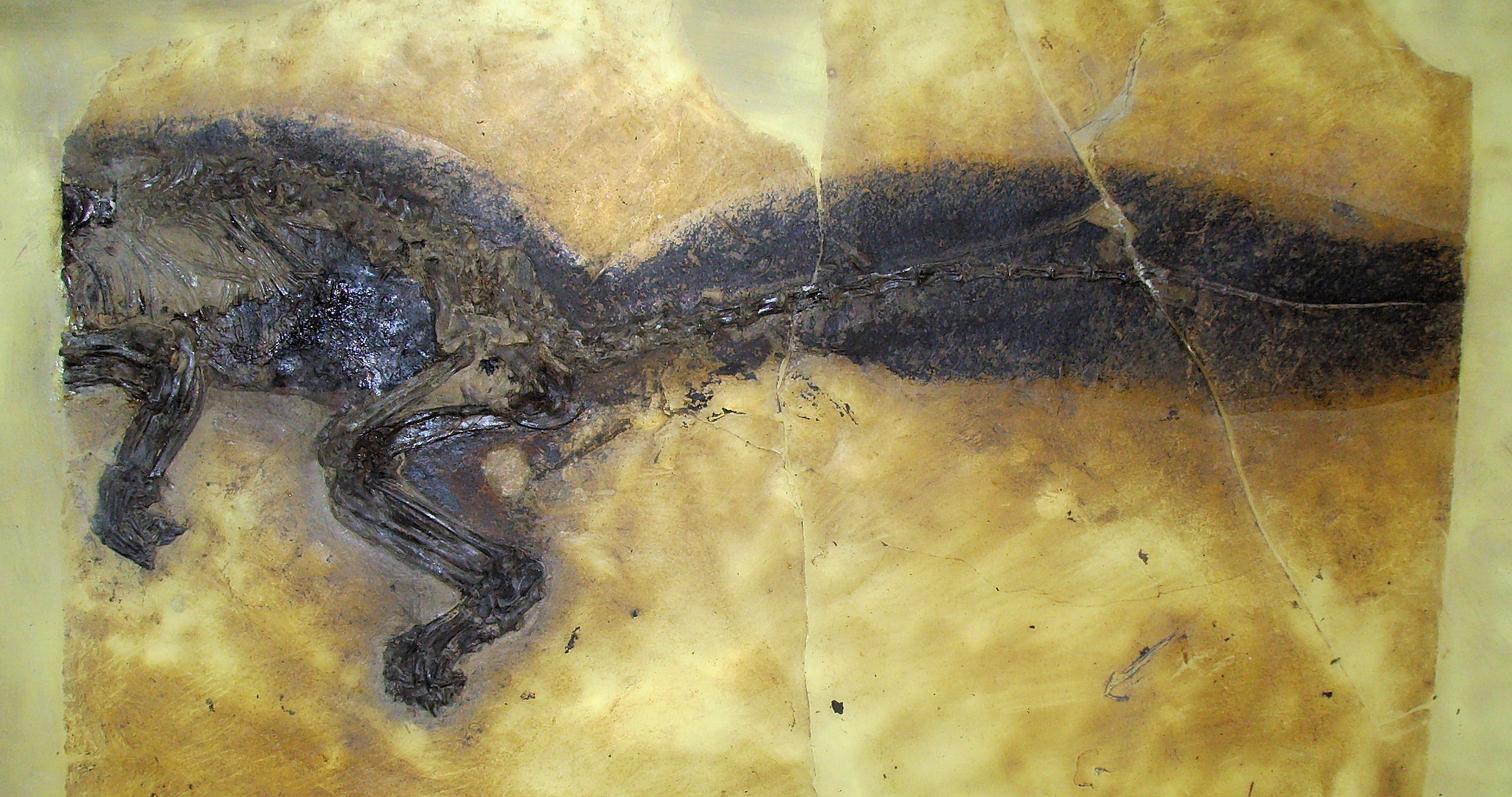 Kopidodon macrognatus. Archivnummer: SMF ME 11287 (A–E). Ort der Verwahrung: Senckenberg Forschungsinstitut und Naturmuseum, Abteilung Messelforschung, Frankfurt am Main, Germany. Alter: ca. 47 Mio. Jahre. Fundort: UNESCO Weltnaturerbe Grube Messel bei Darmstadt. Fund der Senckenberg-Grabung 2007.